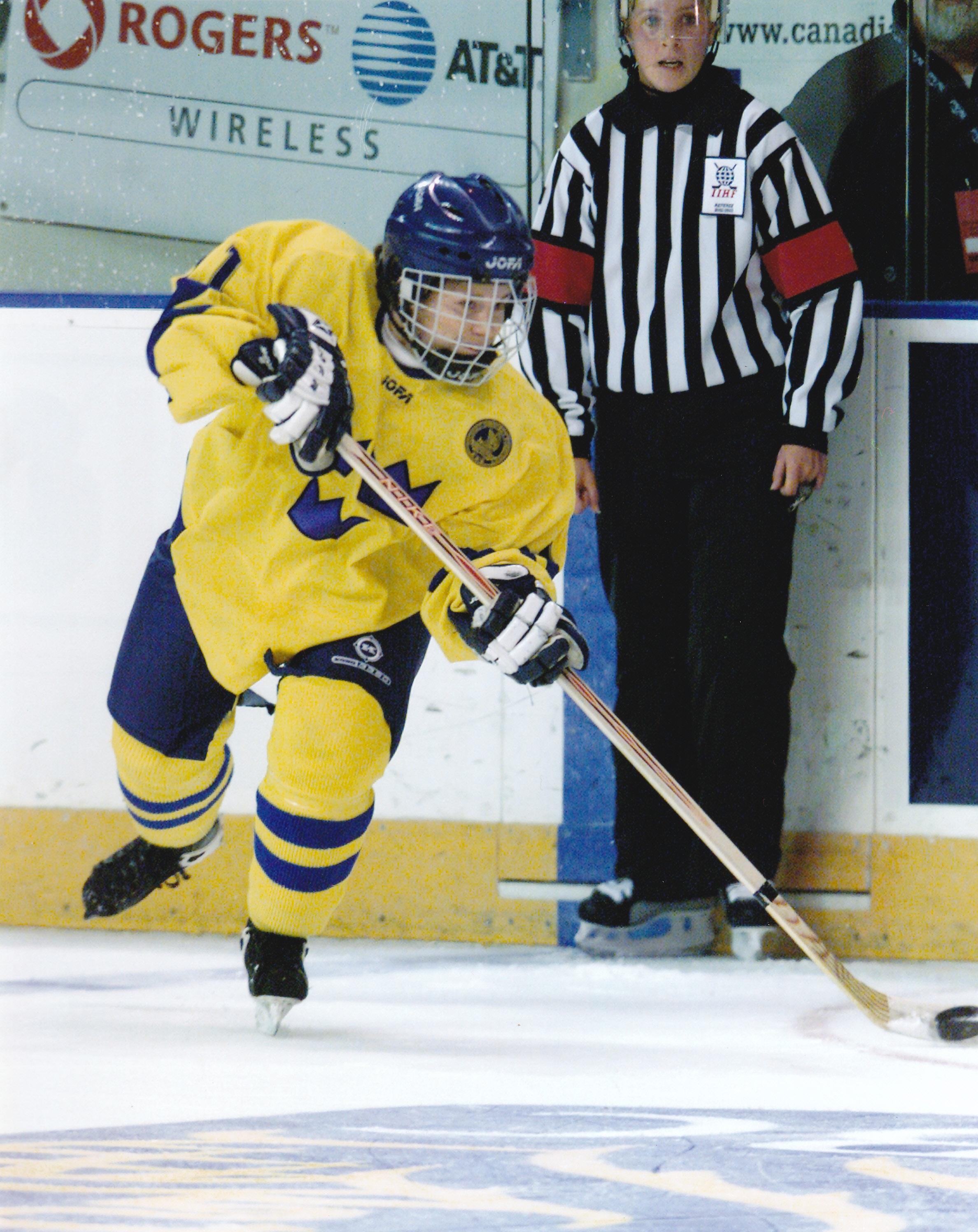 Maria Larsson, Landskamp